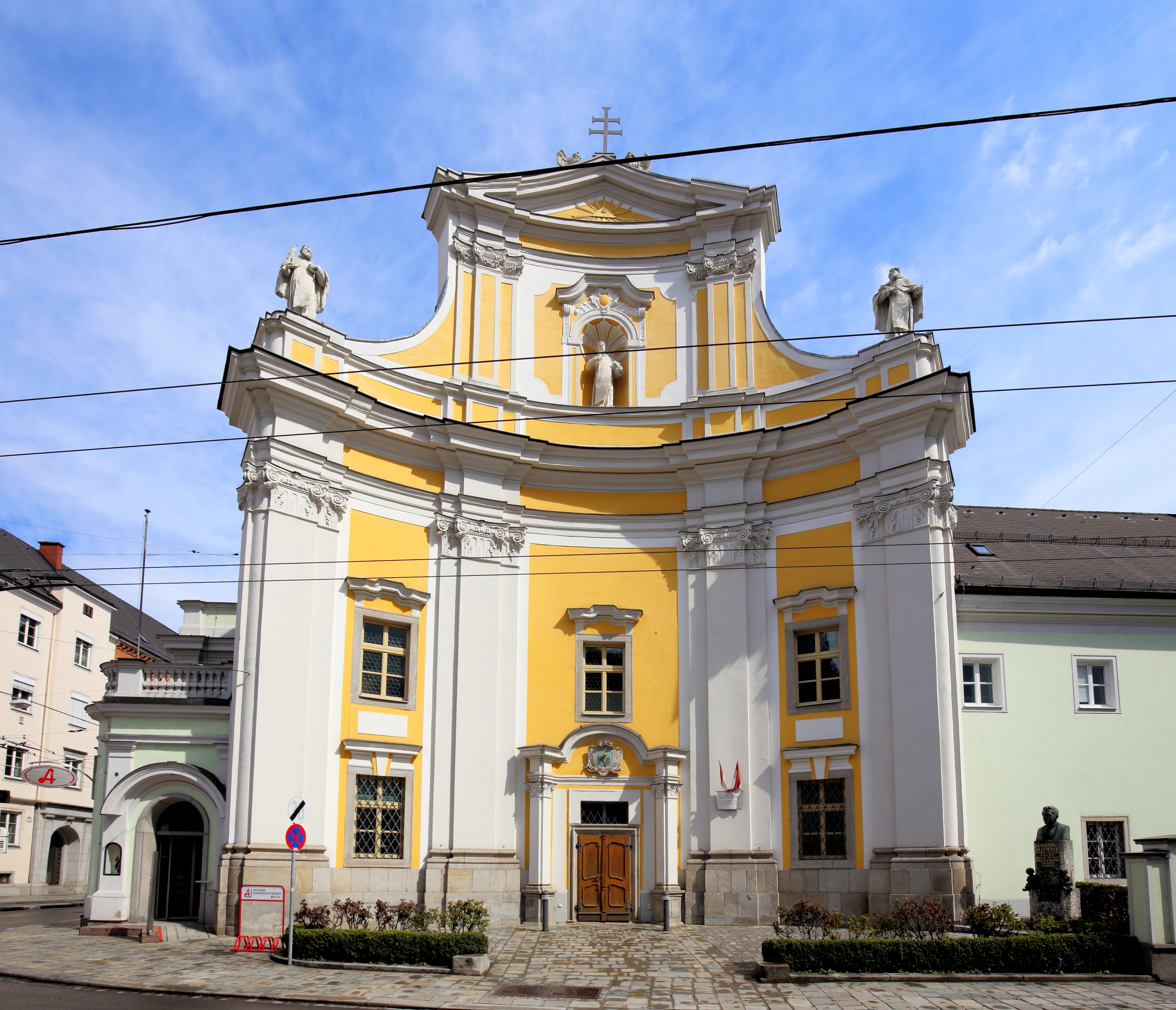 Hauptfassade der Klosterkirche zur Unbefleckten Empfängnis Mariä der Barmherzigen Brüder in der oberösterreichischen Hauptstadt Linz. Die Kirche wurde in der ersten Hälfte des 18. Jahrhunderts als Ordenskirche der Karmelitinnen errichtet. Im Zuge der Josephinischen Reformen löste 1782 Kaiser Joseph II. das Kloster der Karmelitinnen auf. Ende der 1780er-Jahre bezogen die Barmherzigen Brüder den Gebäudekomplex und bauten teilweise die Kirche um.